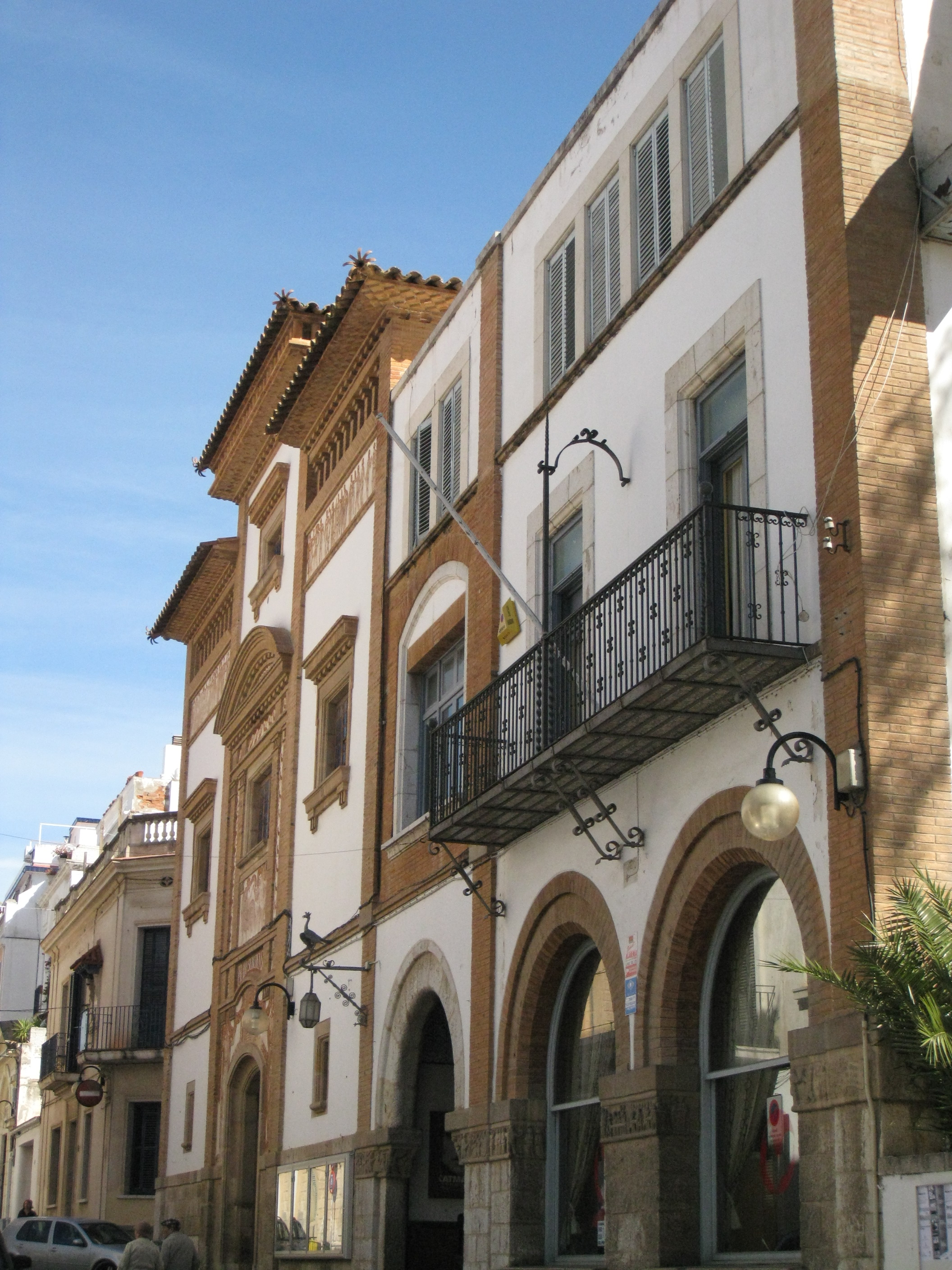 Casino Prado (Sitges)